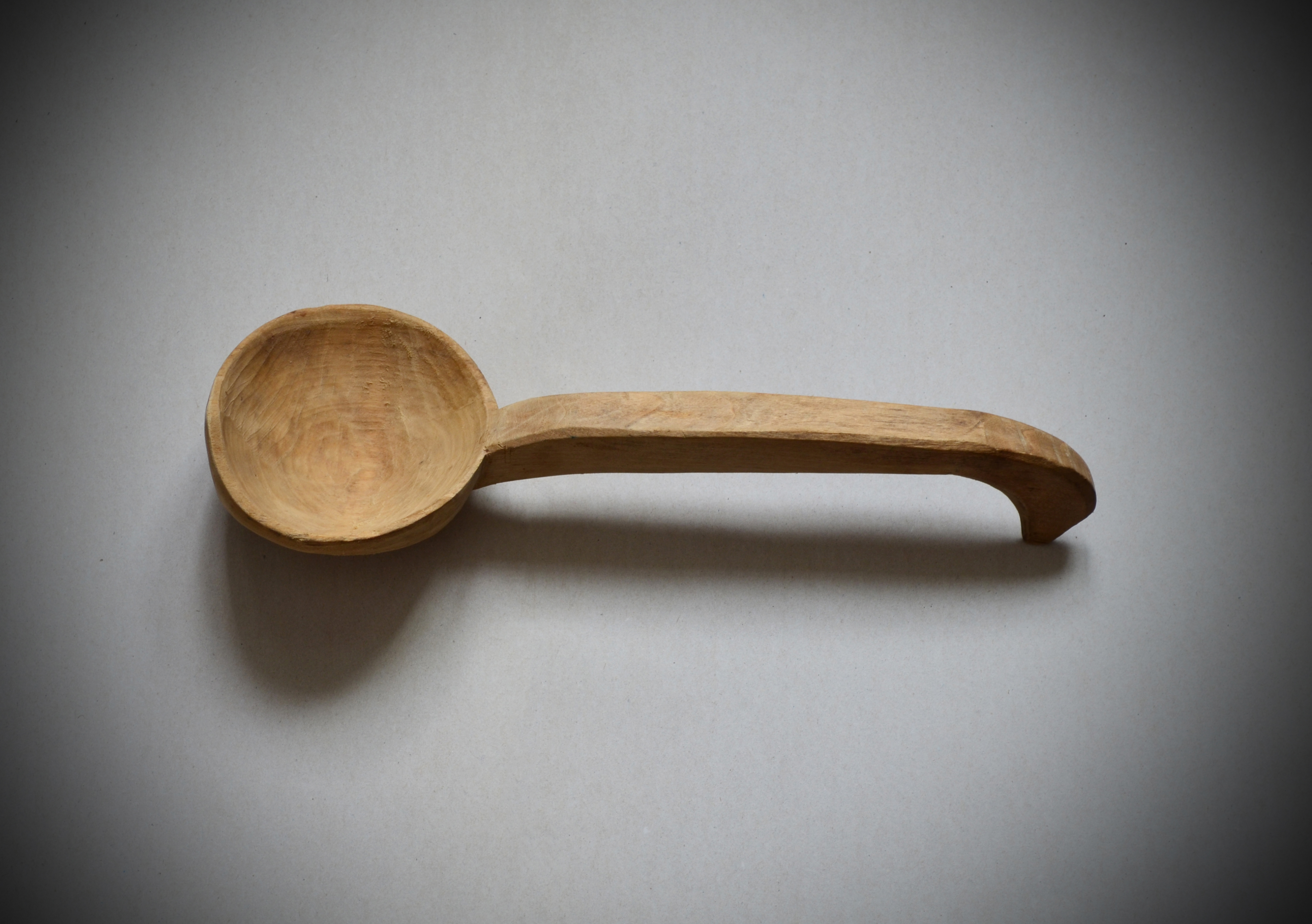 Чюмичка (чюмич) — поварская ложка. Россия, XIX век.